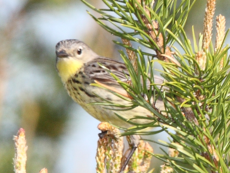 Kirtland's Warbler (Dendroica kirtlandii), female